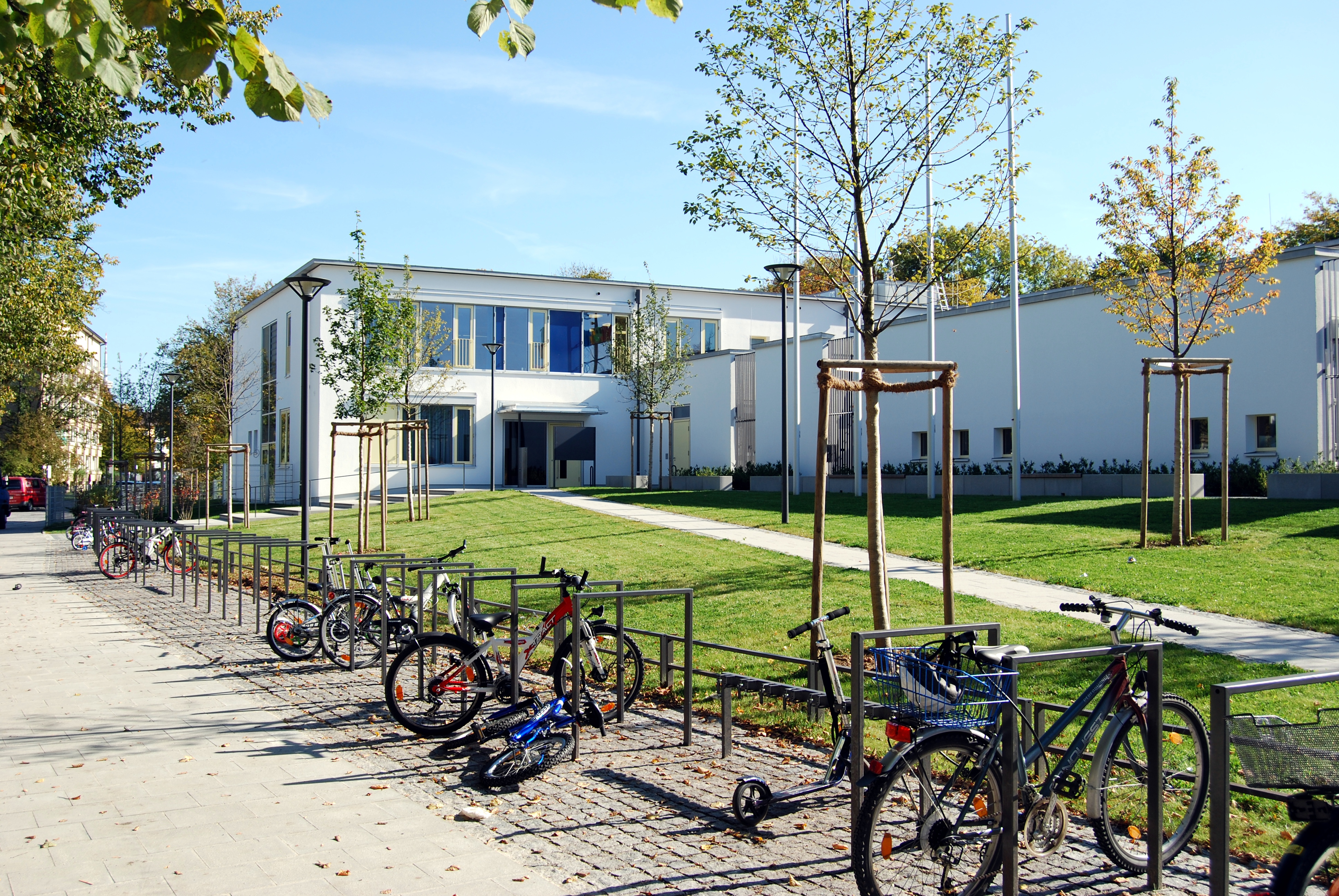 Gebäude der Grundschule am Amphionpark in München-Moosach